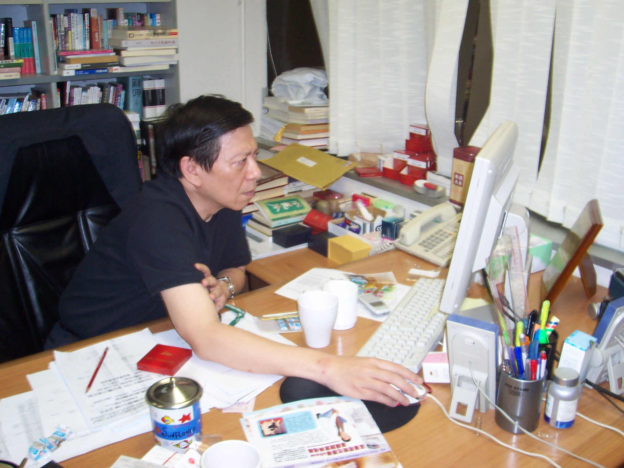 蕭若元在辦工室。2004年12月13日。